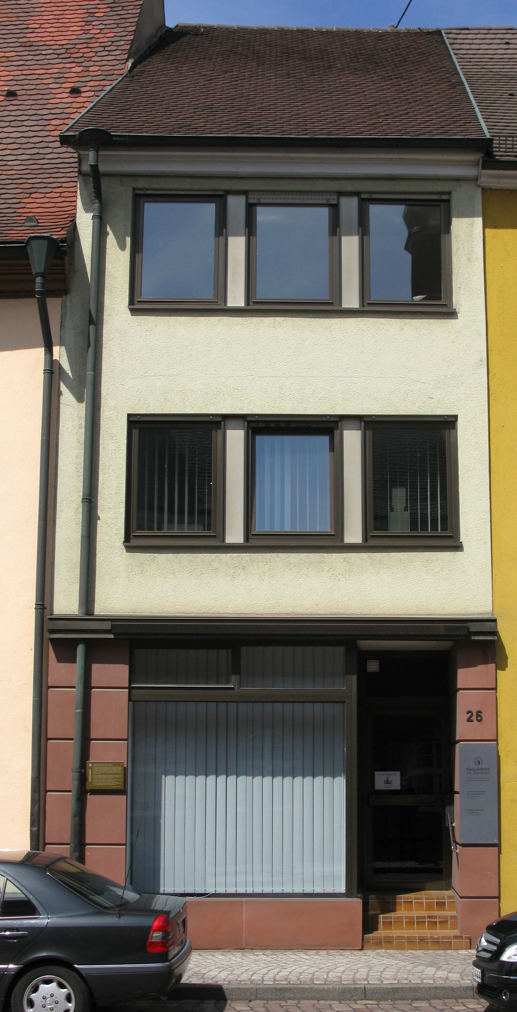 Geburtshaus Heinrich Ochsner in Kenzingen, Hauptstraße 26